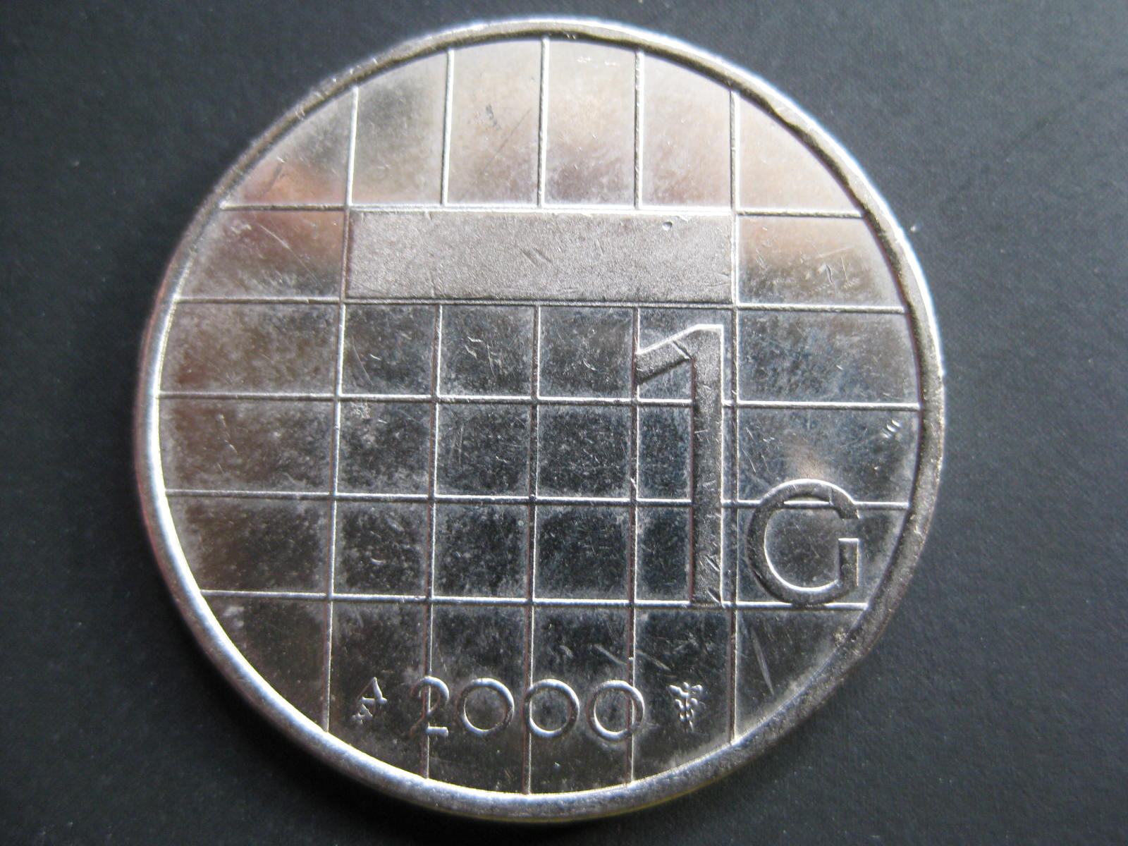 Nederlandse gulden 2000 muntmeesterteken pijl en boog met ster van muntmeester E.J. van Schouwenburg